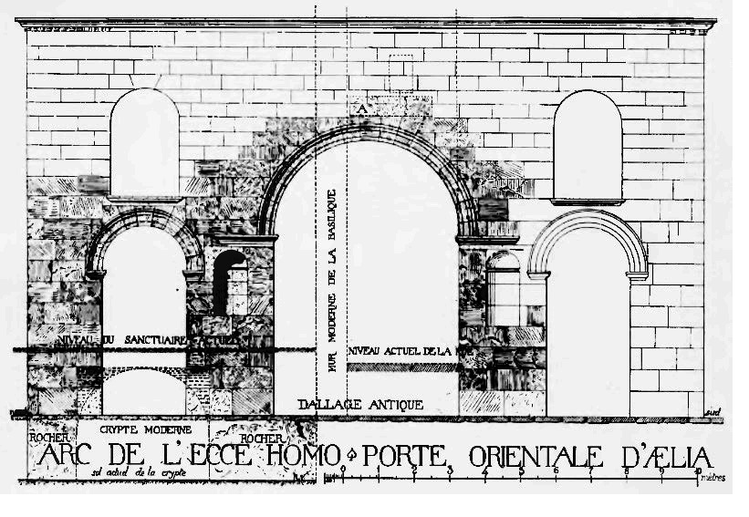 Arch of Ecce Homo in Jerusalem (Vincent, Louis-Hugues, Jérusalem, recherches de topographie, d'archéologie et d'histoire - II, Paris, 1912, p. 25)